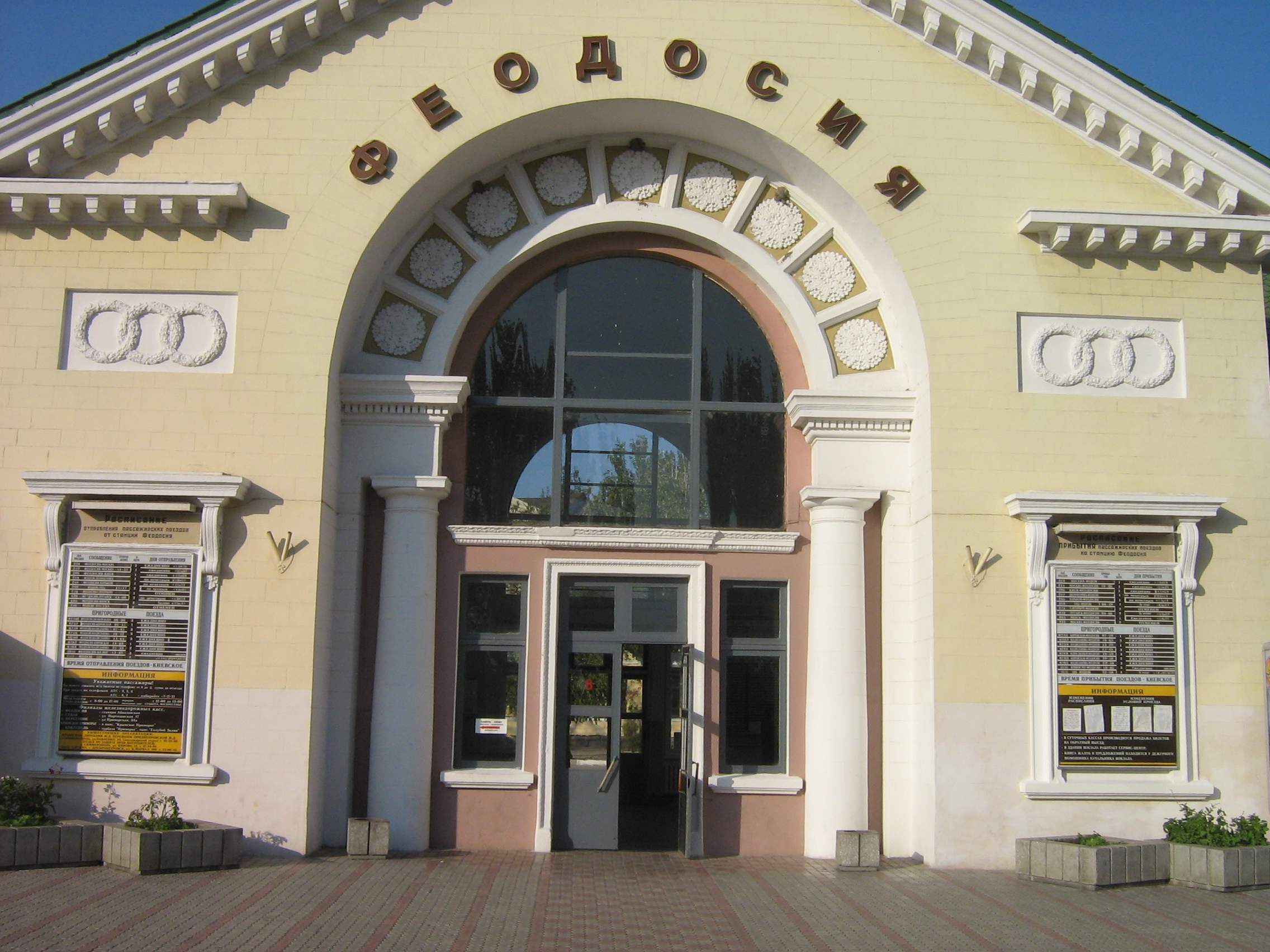 Железнодорожный вокзал станции "Феодосия" Приднепровской железной дороги.